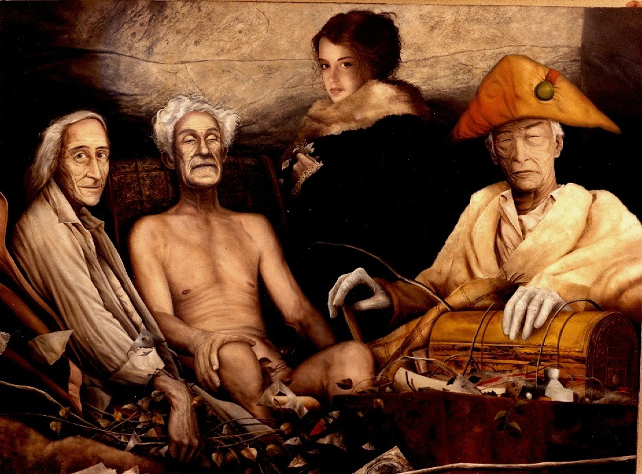 El sueño de un caduco. Óleo - lienzo 180 x 140 cm. Marcial Gómez 1980